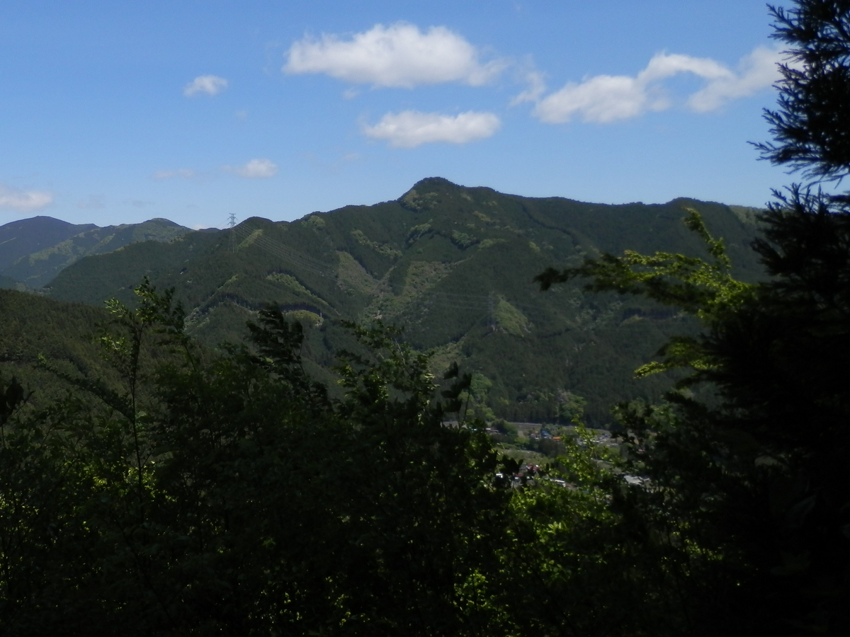 日の出山北尾根より望む惣岳山。